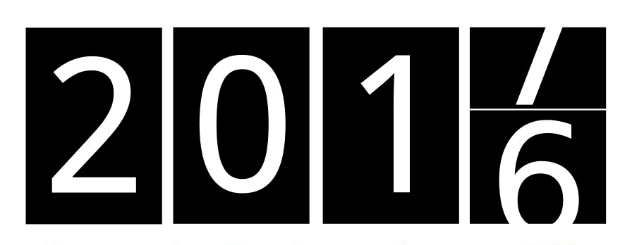 Логотип до дня суспільного надбання 2017 року